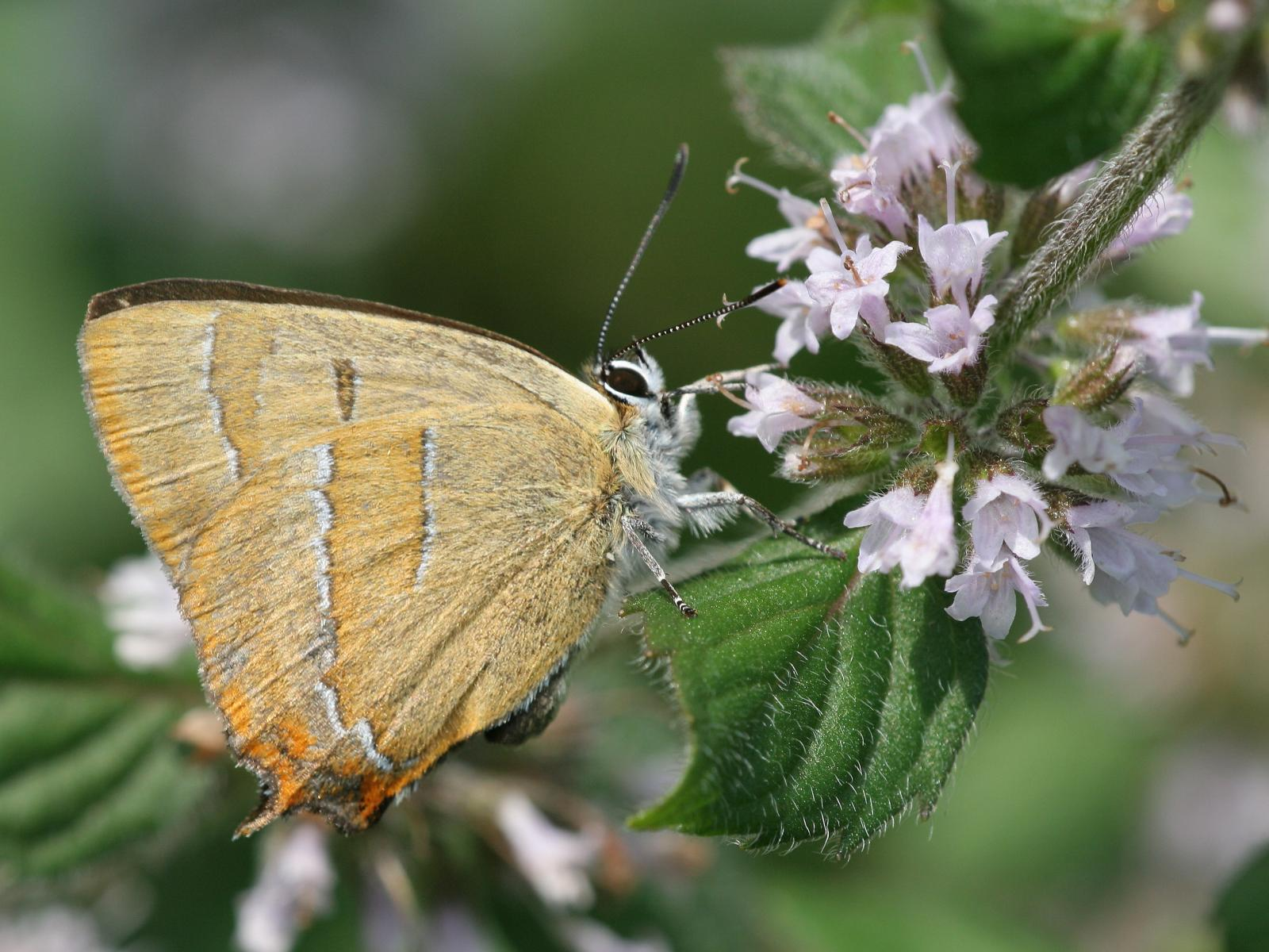 Nierenfleck-Zipfelfalter (Thecla betulae, Männchen) im Quaßliner Moor